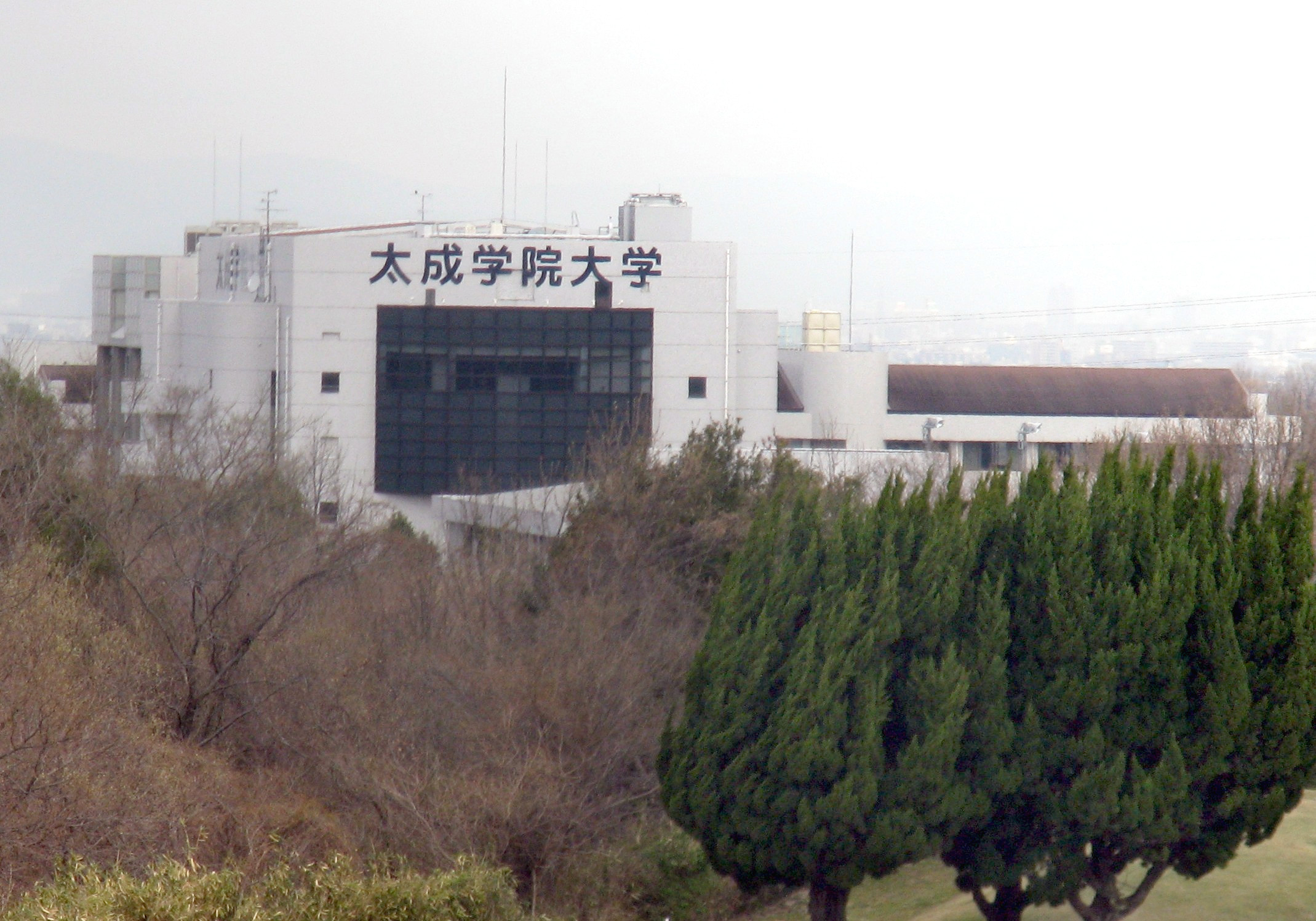 太成学院大学